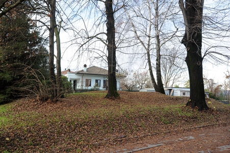 Tumulo funerario del VI sec. a.C., in località Beati a Castelletto sopra Ticino (NO), Italia.